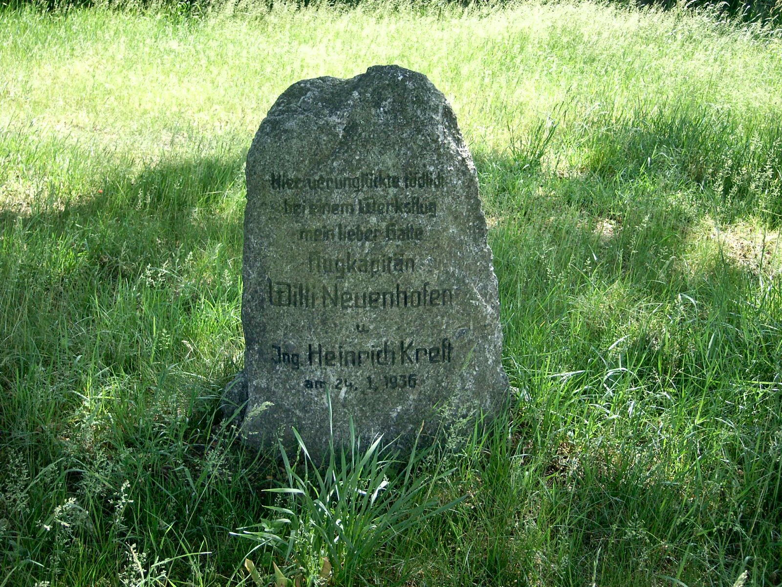 Willi Neuenhofen und Heinrich Kreft Gedenkstein in Kleutsch